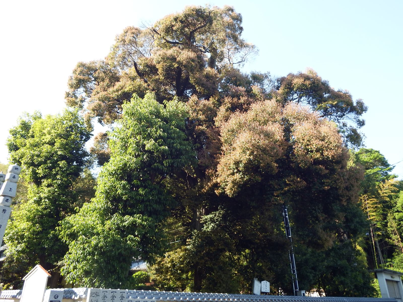 延命寺のツブラジイ